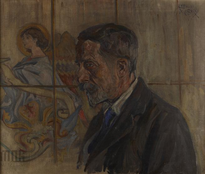 Muzeum Narodowe w Krakowie, MNK IX-4525.